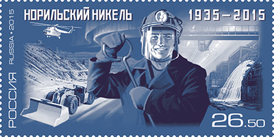 Горно-металлургическая компания «Норильский никель»